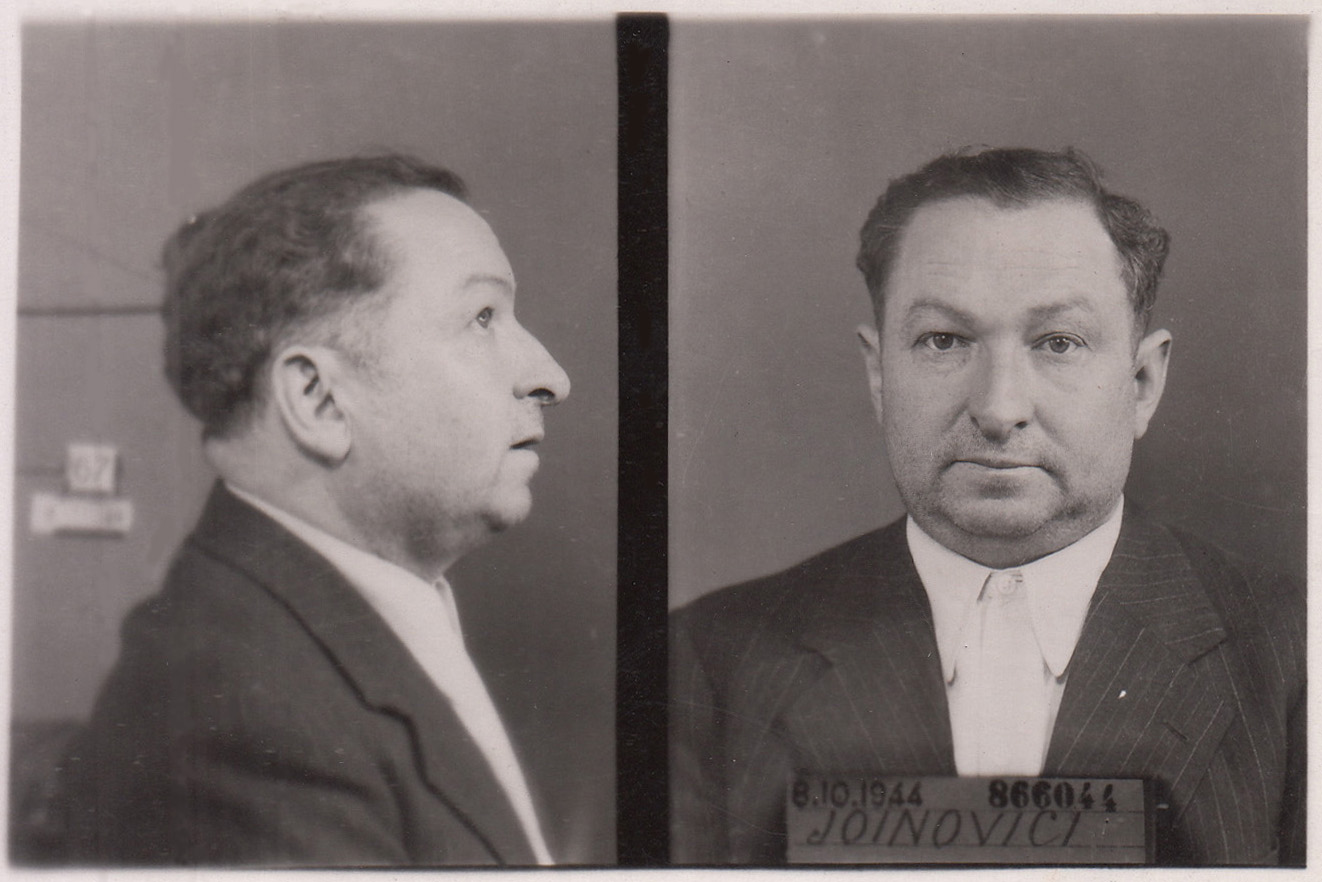 Photographie d'identité judiciaire de Joseph Joanovici, octobre 1944.